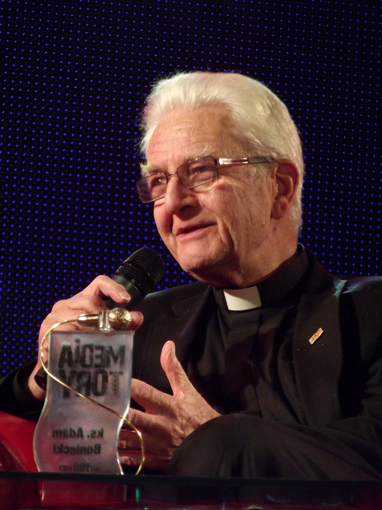 Zdjęcie zrobione podczas gali rozdania dziennikarskich nagród dziennikarskich MediaTory 2013 w Krakowie.